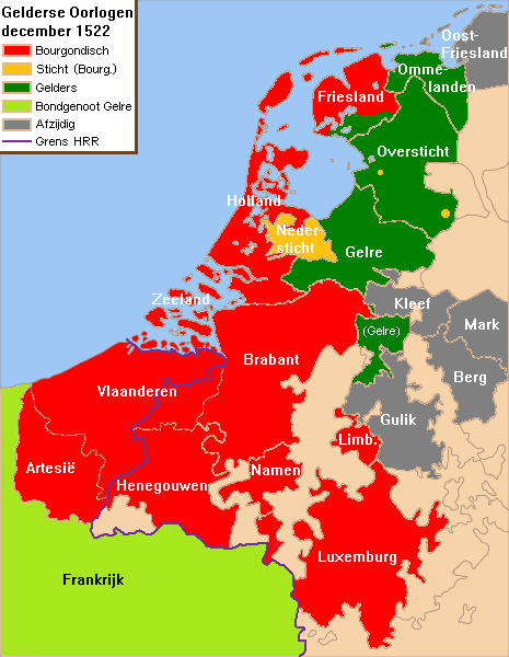 Overzicht Gelderse Oorlogen in december 1522 op het hoogtepunt van de Gelderse macht.